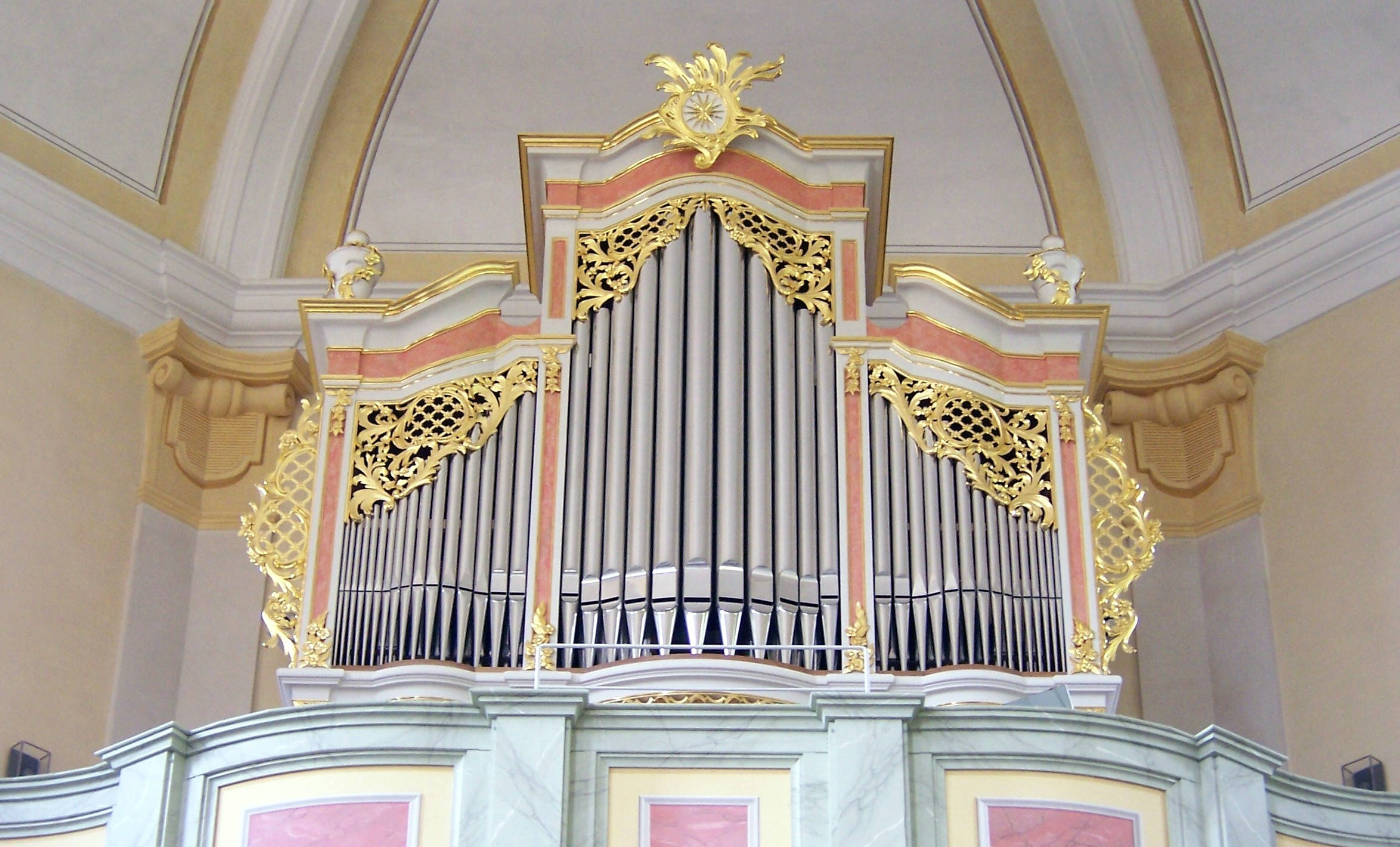 Die neue Wegscheider-Orgel in der Loschwitzer Kirche in Dresden